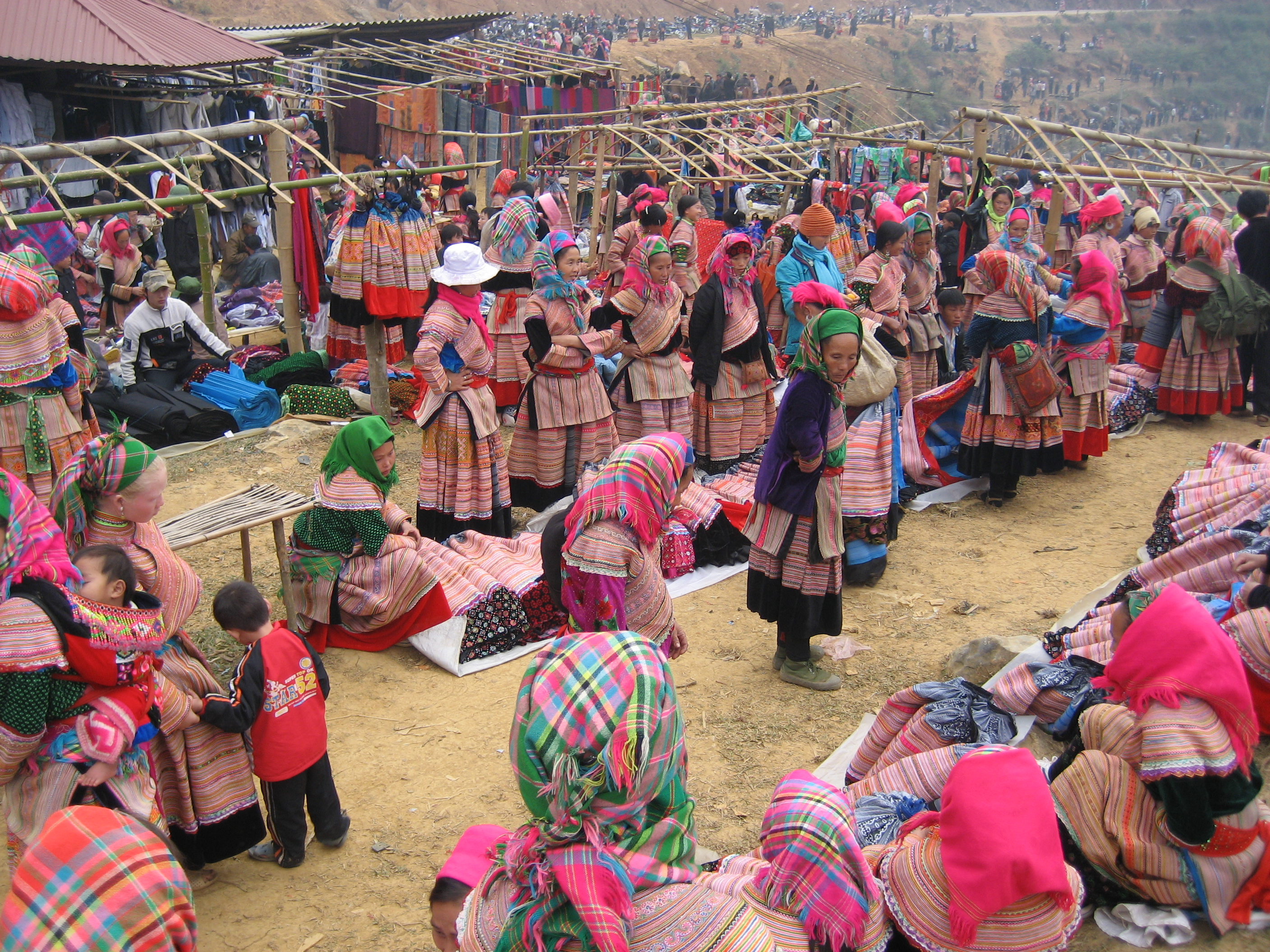 Can Cau market